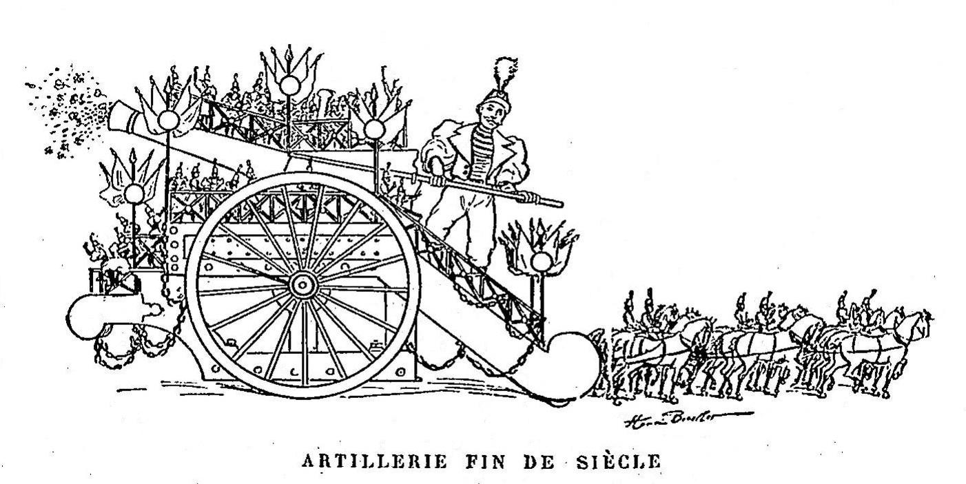 Char lanceur de fleurs et confettis au Carnaval de Nice 1895. Commentaire du dessin : (page 135)